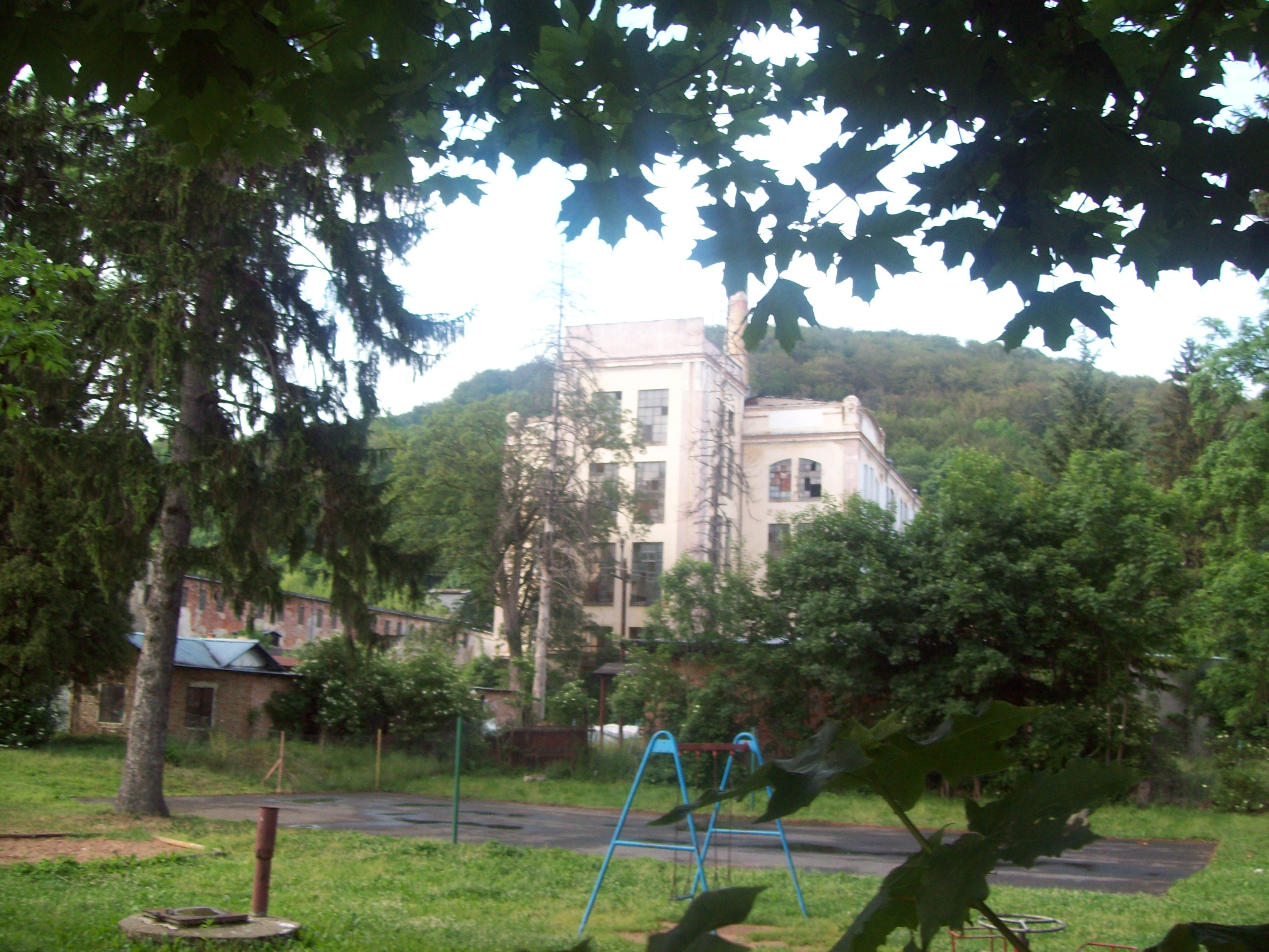 Ołdrzychowice Kłodzkie - widok ogólny na ZPL "Lech" (zabytek nr A/4460/1239/Wł z 19.07.1988)